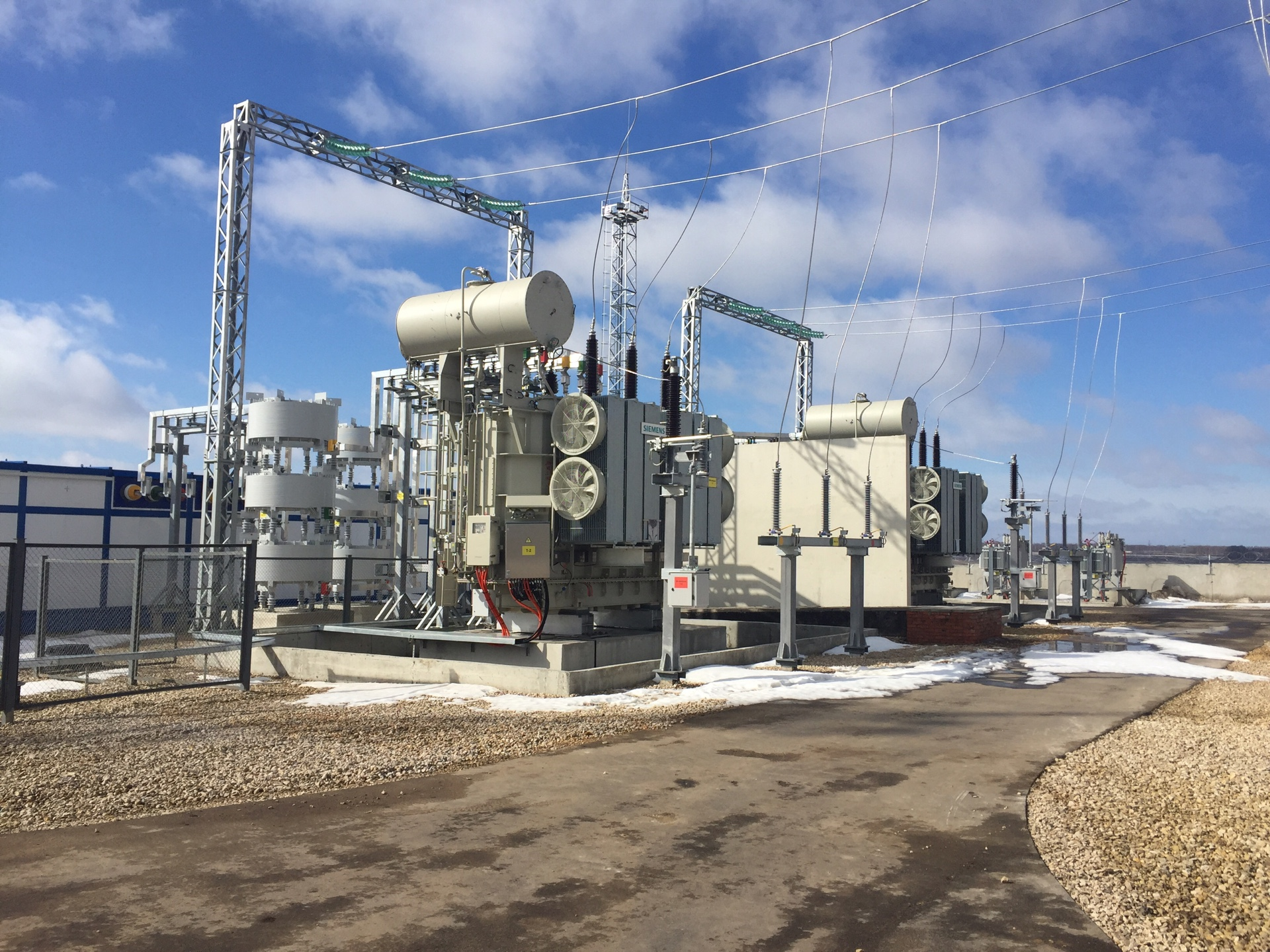 Подстанция «Индустриальная»